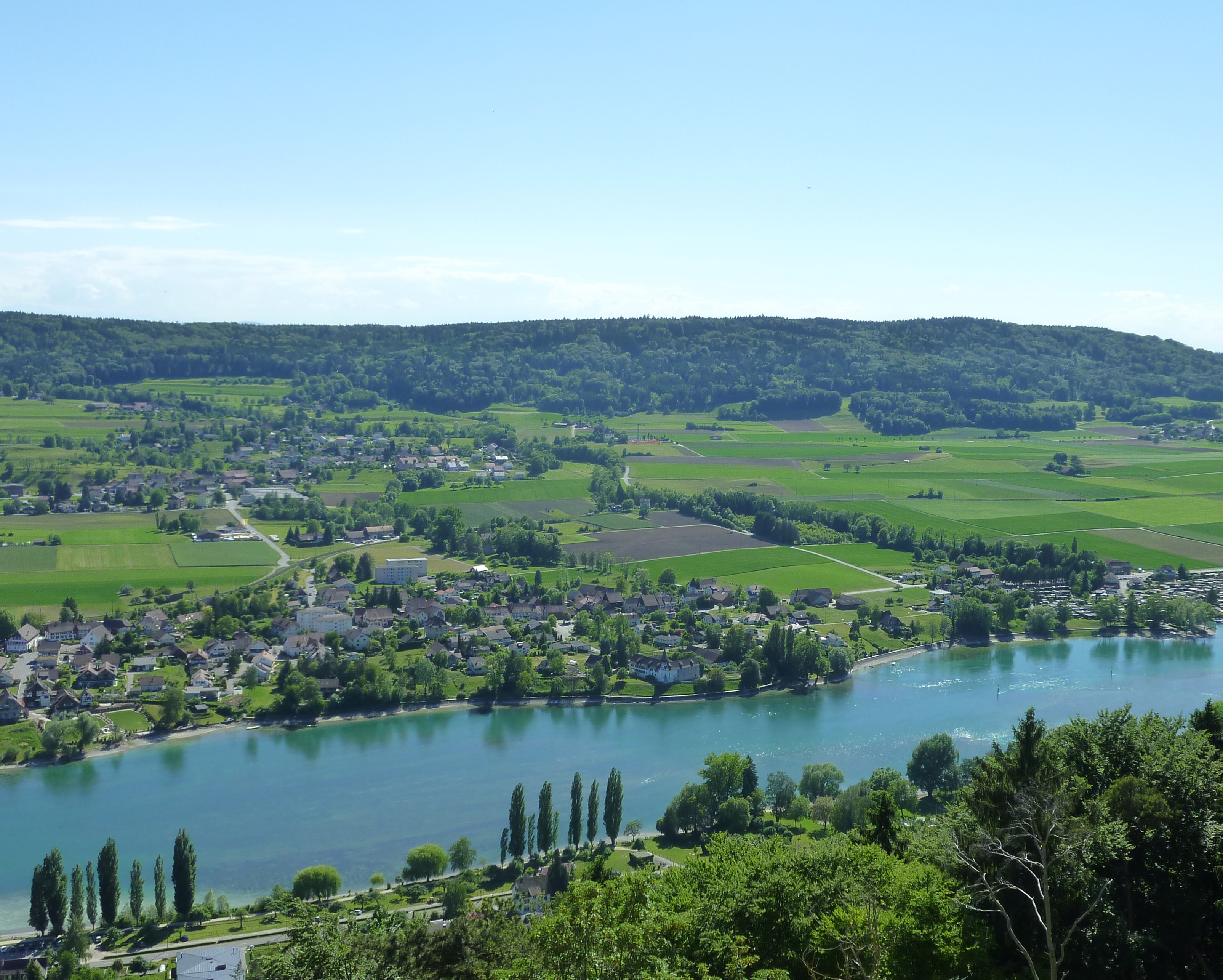 Wagenhausen TG von der Burg Hohenklingen aus gesehen. In der Mitte ehemalige Propstei Wagenhausen./de